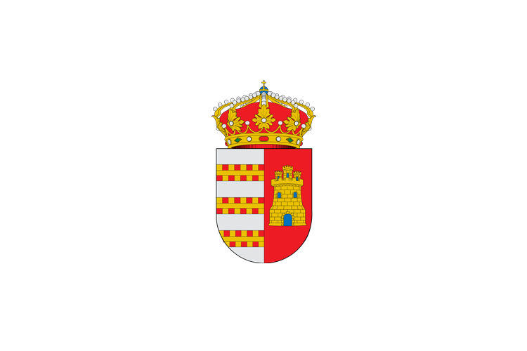 Bandera municipal de Castellar de la Frontera (Cádiz).